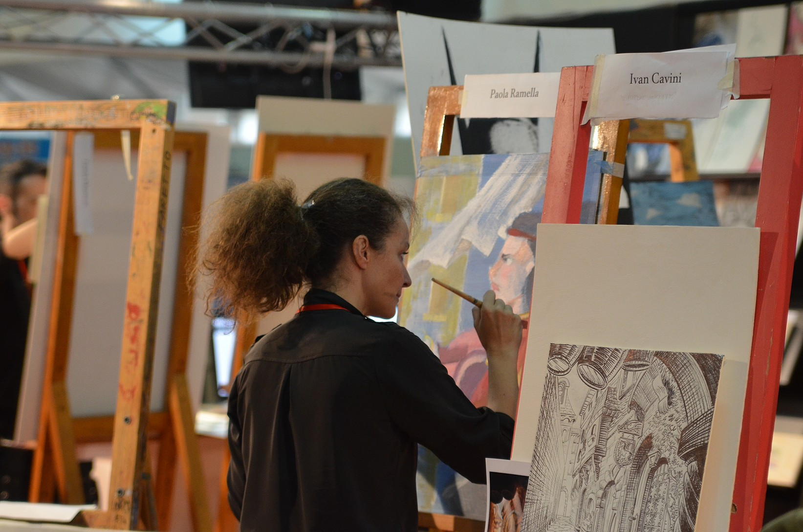 Lucca Comics 2012